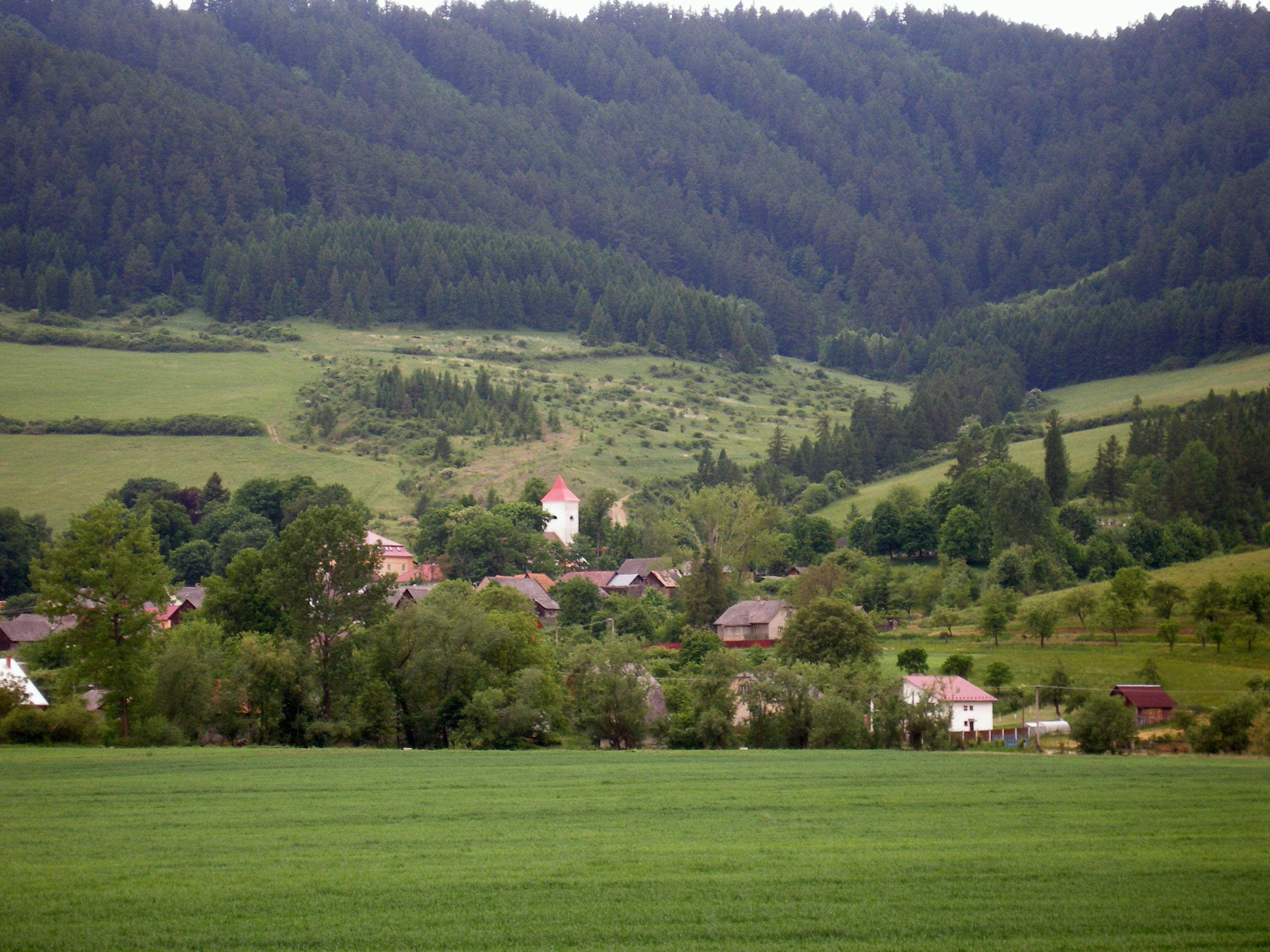 Obec Brezovička okres Sabinov